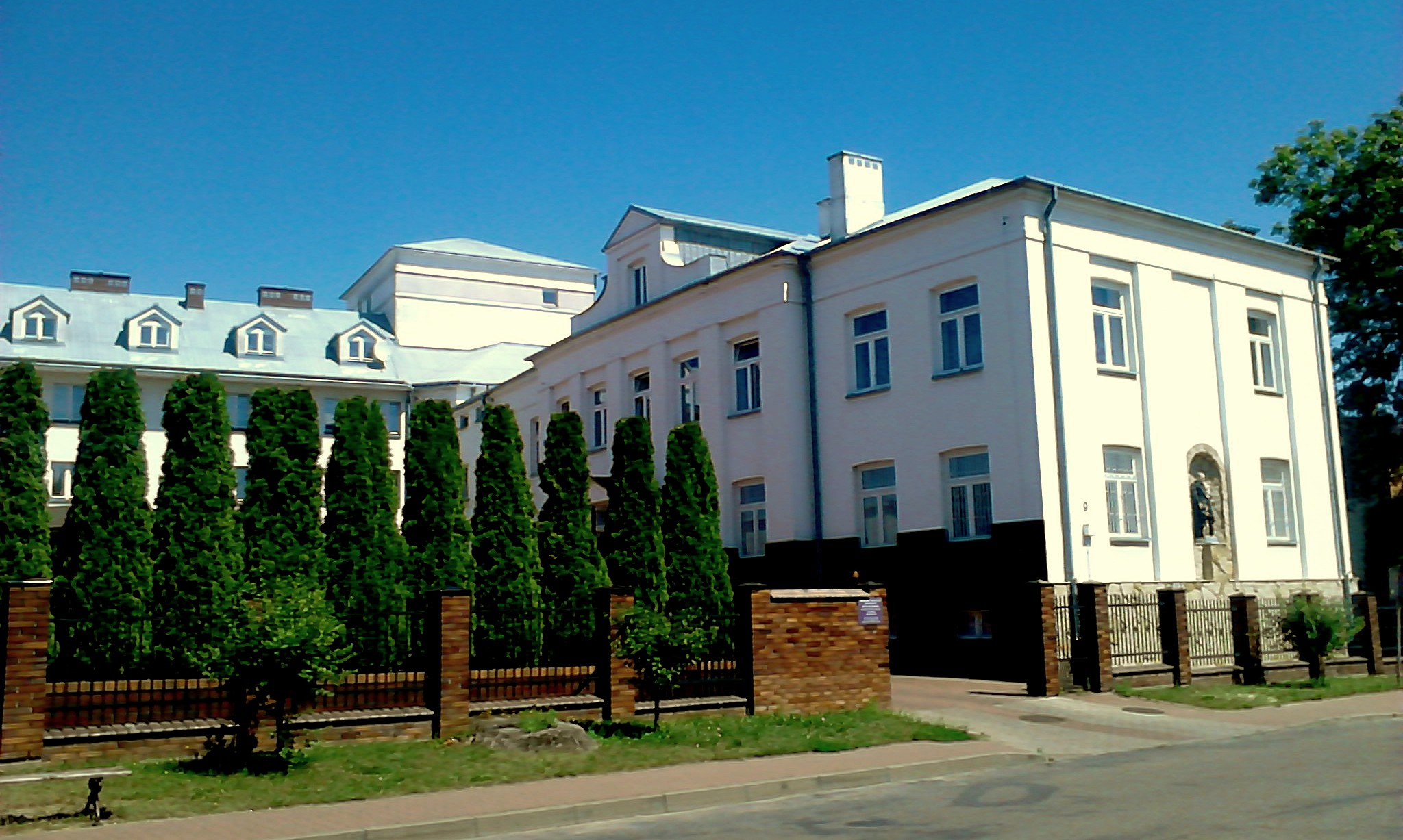 Dom opieki prowadzony w Przasnyszu przez siostry szarytki